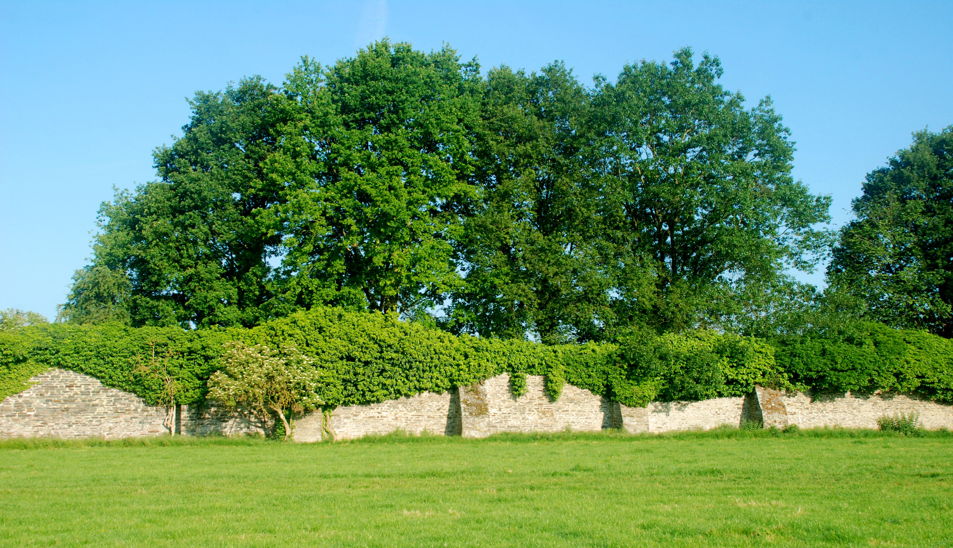 Belgique - Brabant wallon - Mur d'enceinte de l'abbaye de Villers-la-Ville - Côté intra-muros